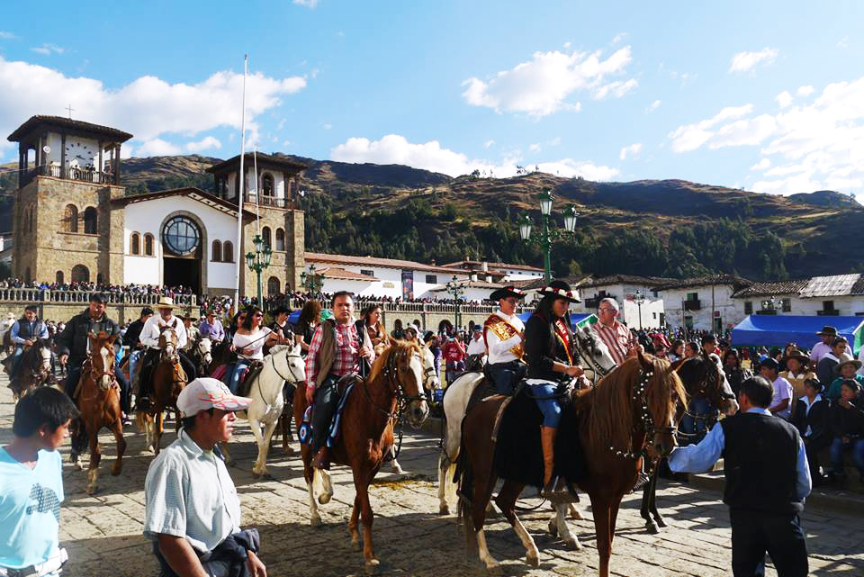 Capitanes de la carrera de cintas acompañados por amigos y familiares sobre corceles dando inicio a las festividades del día 17.